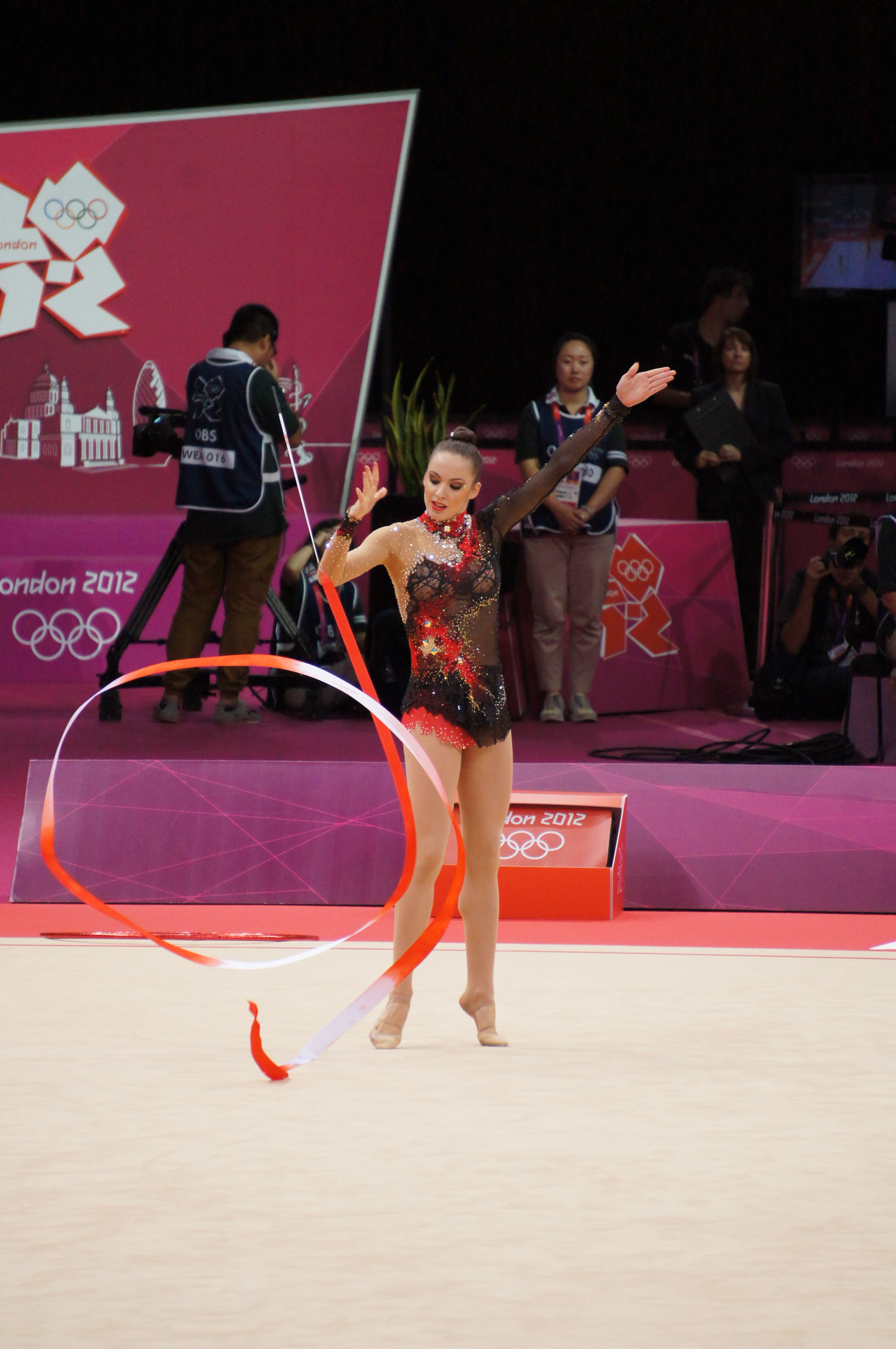 Conjunto español de gimnasia rítmica en los Juegos Olímpicos de Londres 2012.